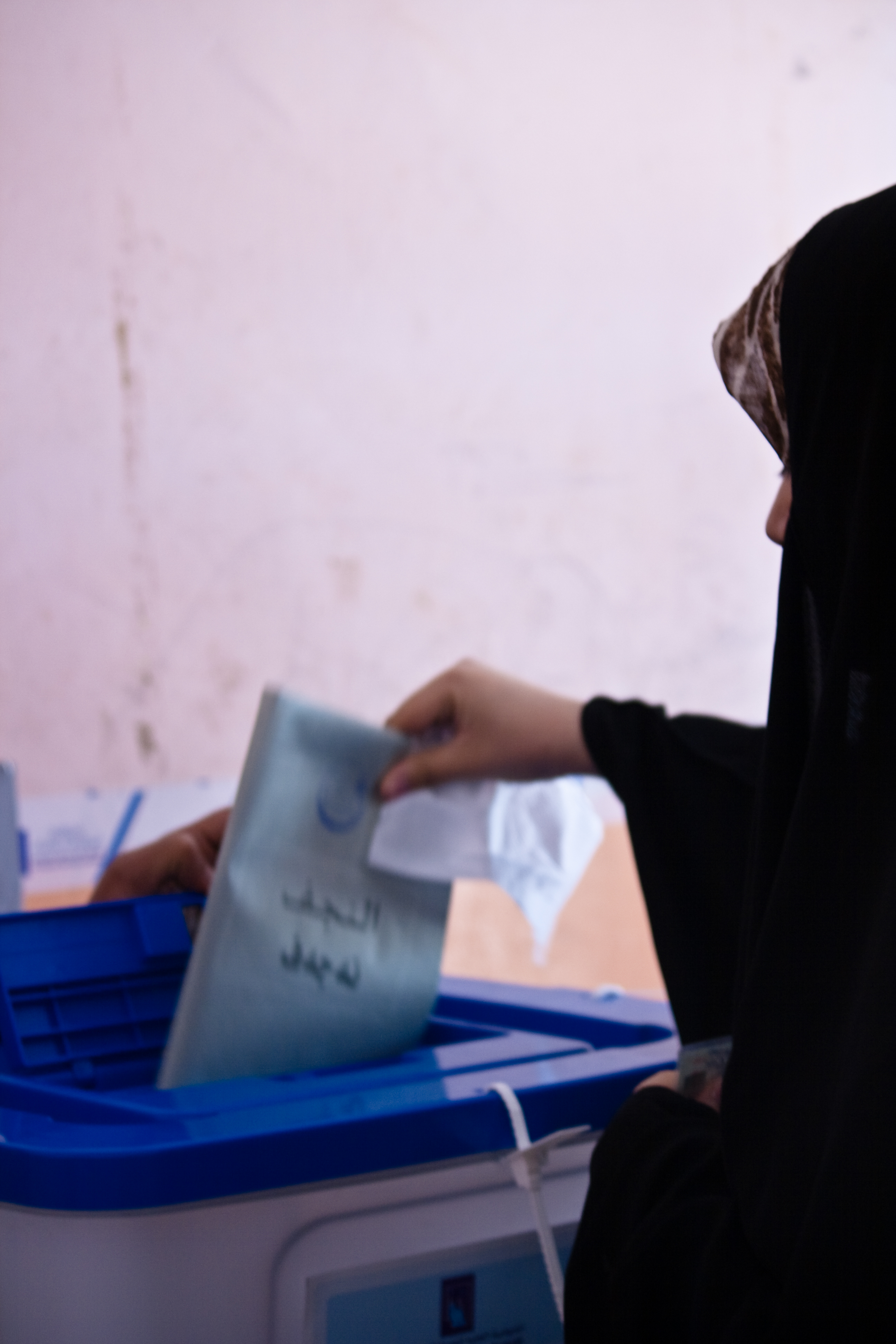 A woman is voting in Najaf